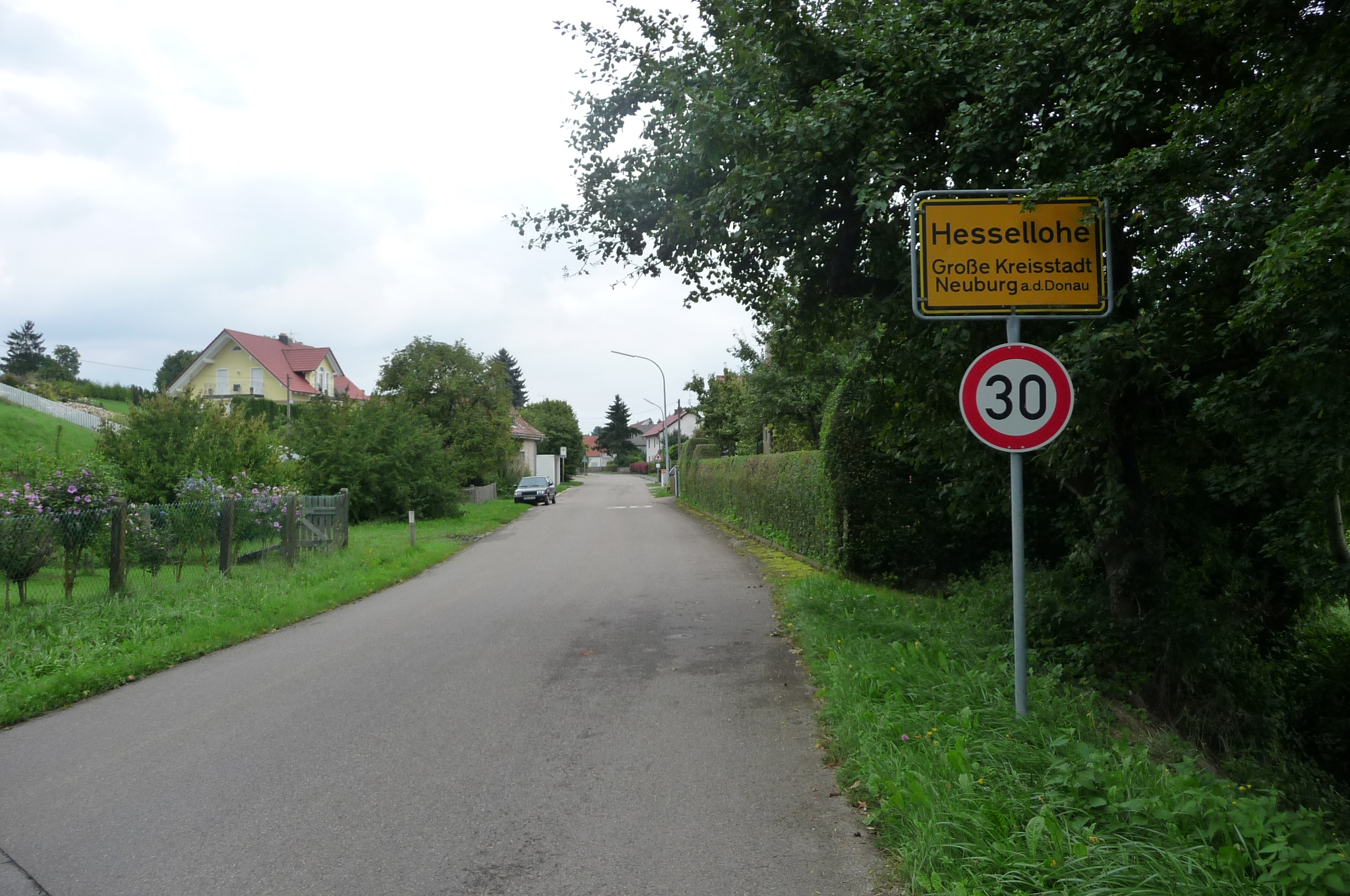 Ortsbild von Hesselohe